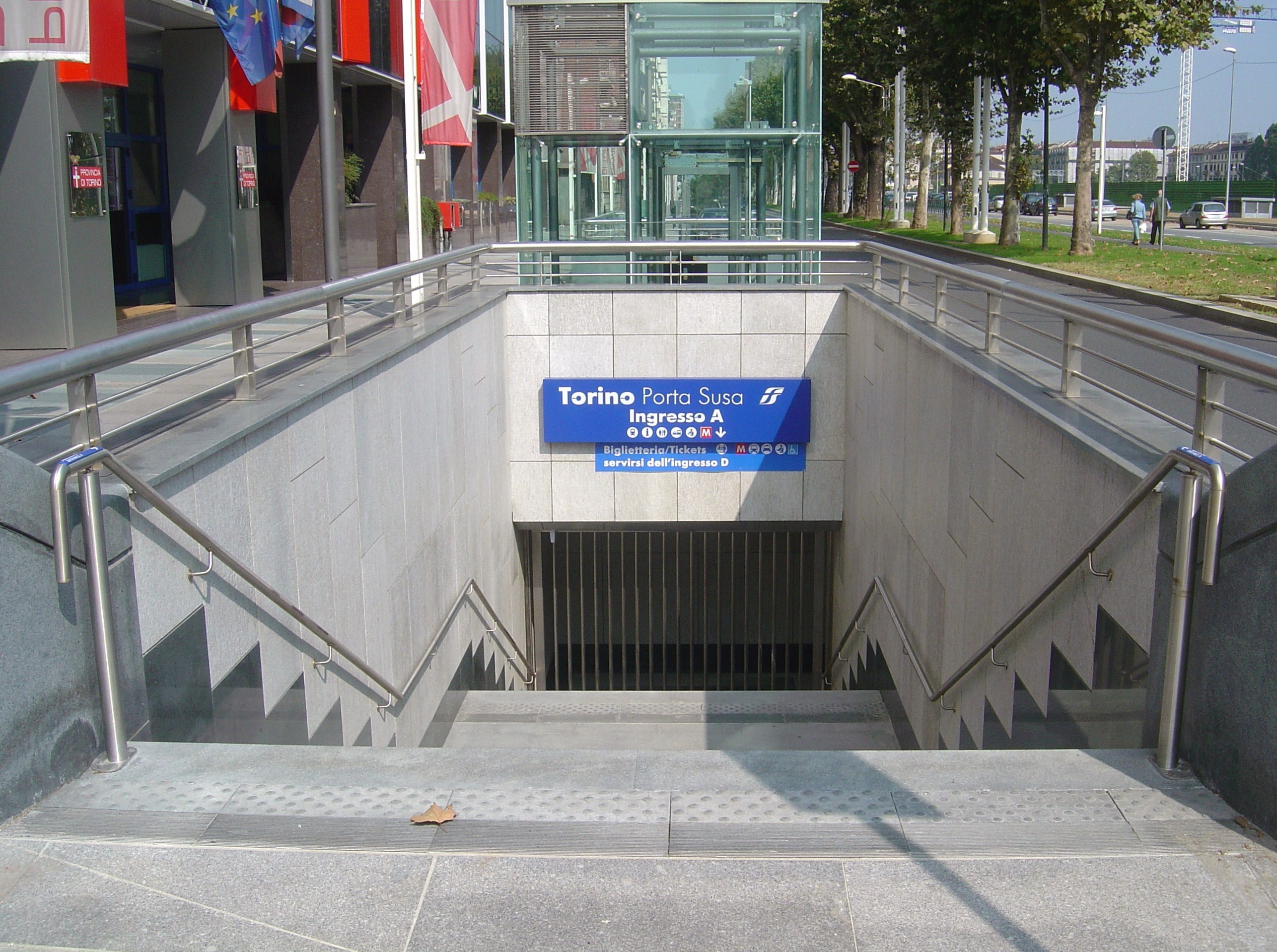 Ingresso A della nuova stazione di Torino Porta Susa davanti a Corso Inghilterra, di fronte al Palazzo della Provincia di Torino